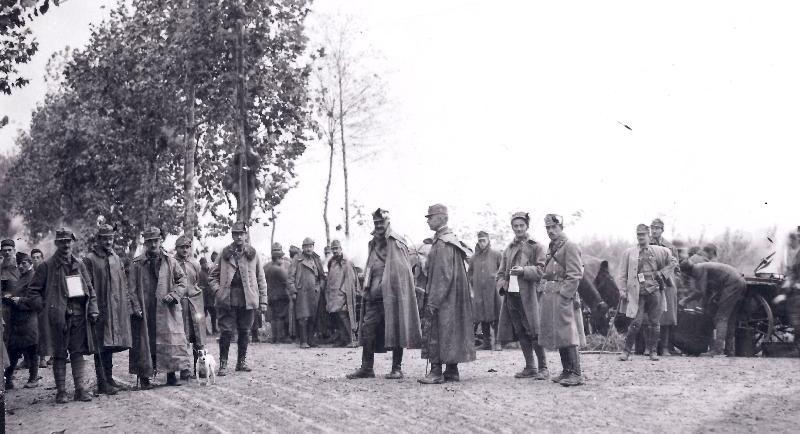 2. gorski strelski polk se je v Furlanijo umaknil po preboju pri Kobaridu oktobra 1917. Že 13. novembra je dosegel reko Piavo in tu ostal do poraza v krvavi bitki na Piavi junija 1918.